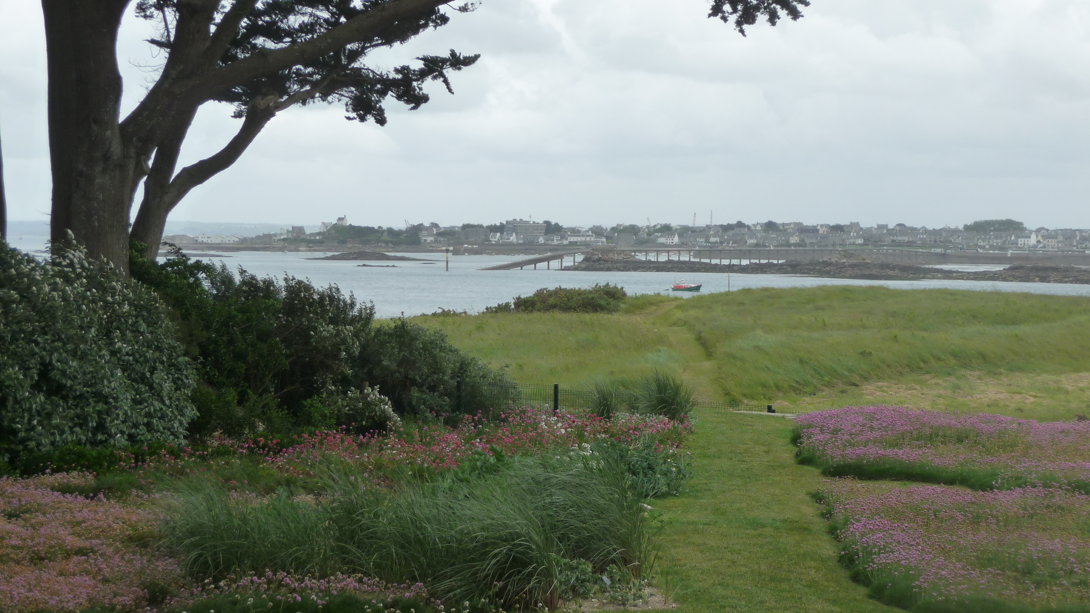 Île de Batz : jardin Georges Delaselle, vue sur Roscoff